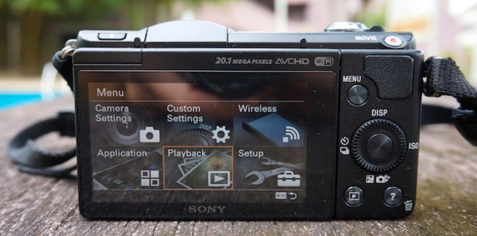 Sony Alpha 5000 with 16-50 mm.